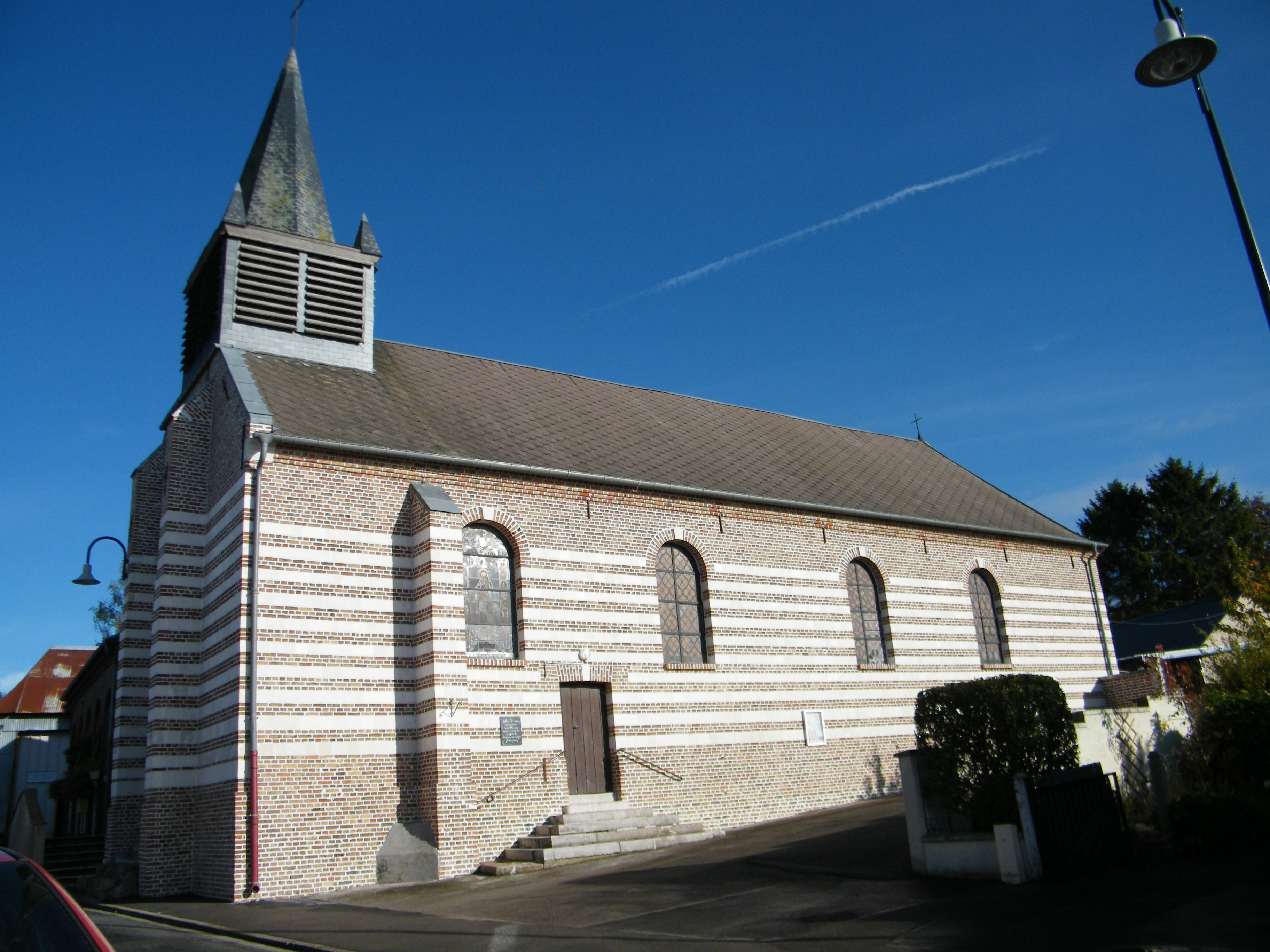 L'église Saint-Vaast de Saint-Vaast-en-Chaussée , Somme, France.